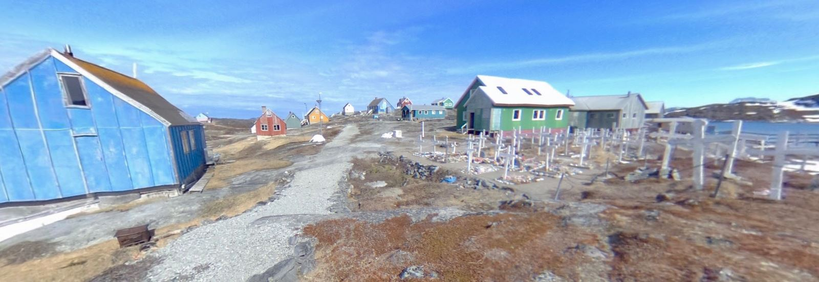 Napasoq